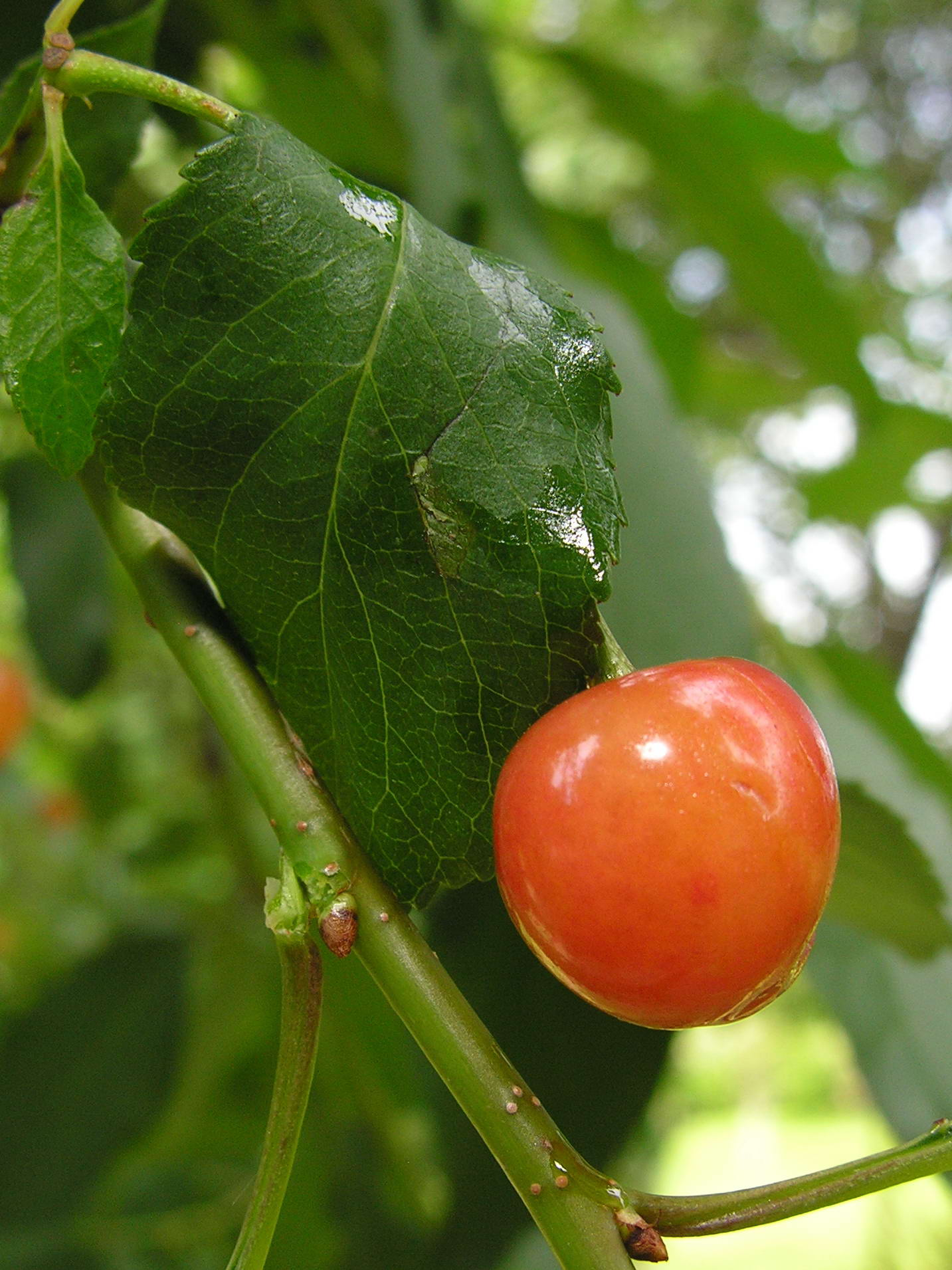 Guinda. Fotografadas en Bastabales. Galicia